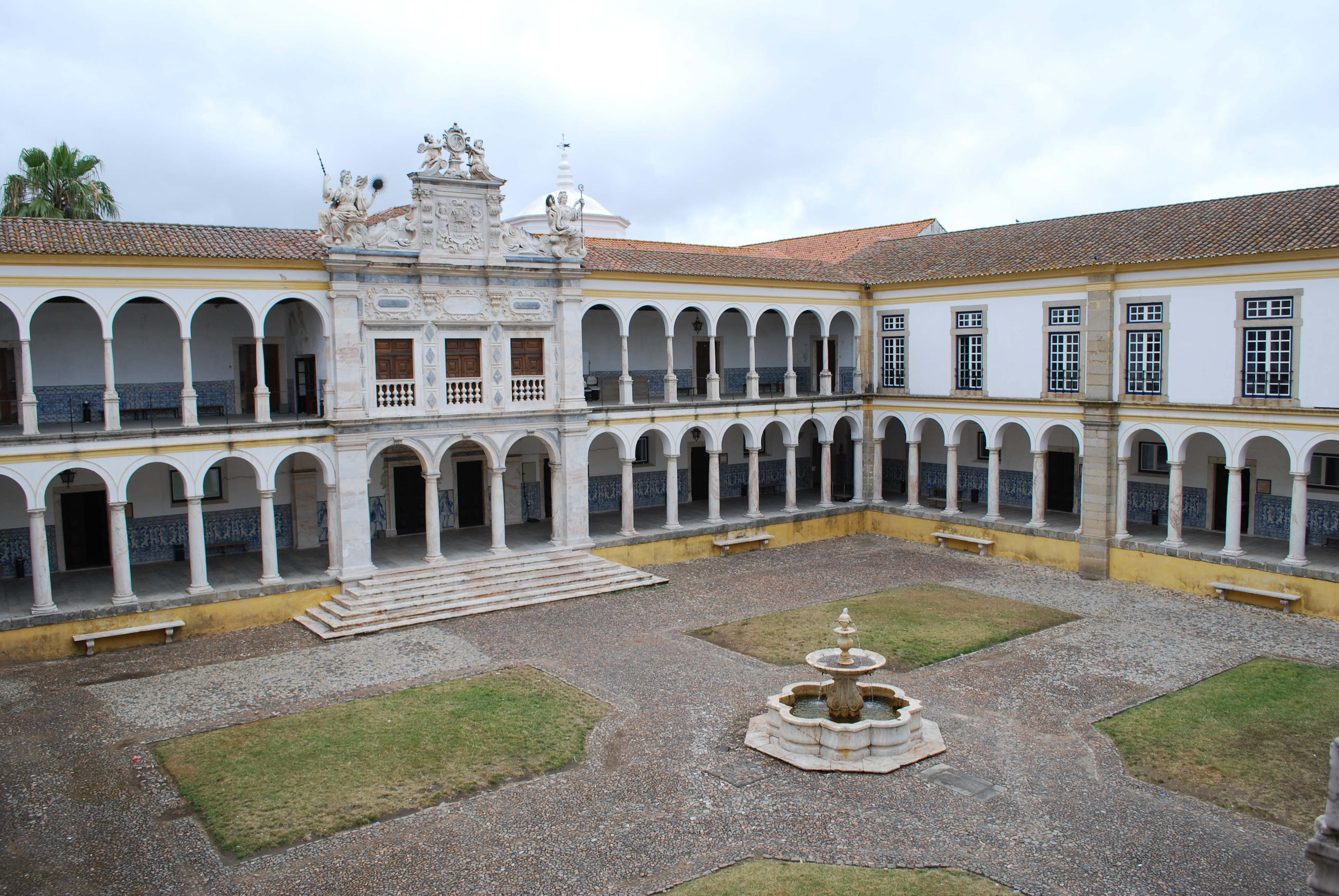 Claustro geral dos Estudos na Universade de Évora, antigo Colégio do Espírito Santo ou Colégio da Companhia de JesusUnknown This file was uploaded for Wiki Loves Monuments in Portugal with the unique identifier 69788.